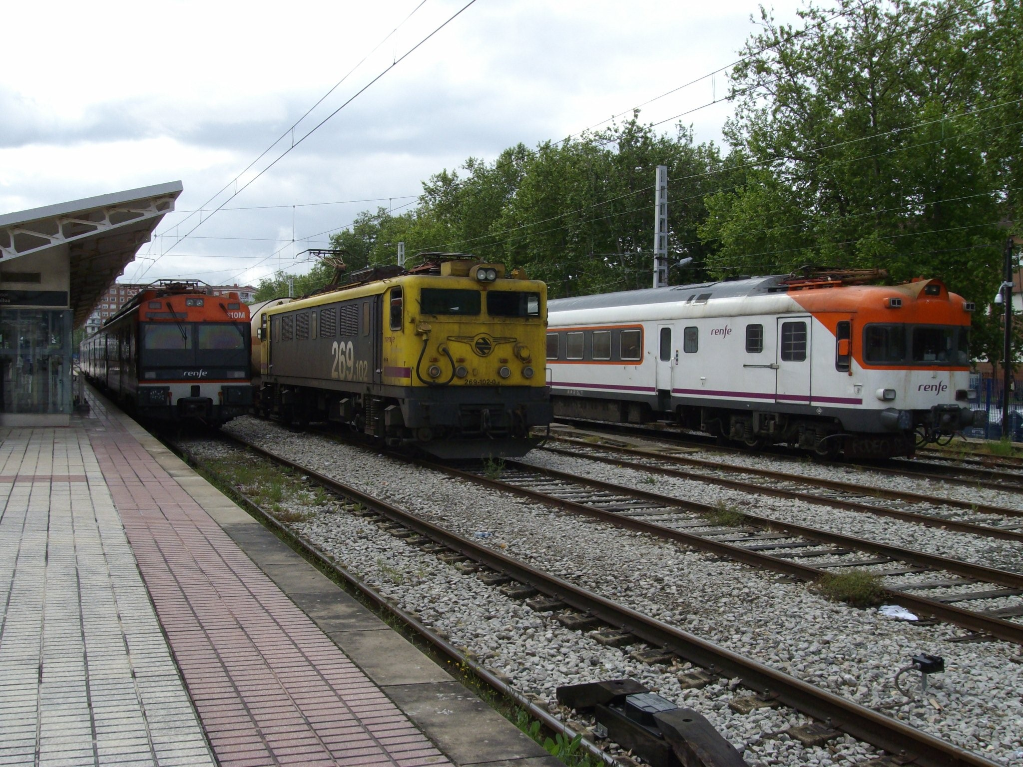 432 269 y 470 Lo más curioso es que la 470 venía desde Pamplona, ver una de estas por allí es muy dificil